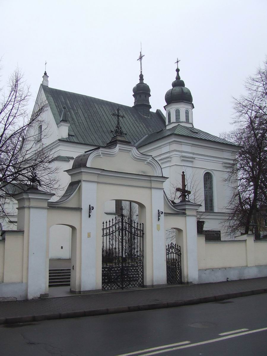 Biała Podlaska, kościół pw. św. Anny z 1572 r., dawny zbór ariański.